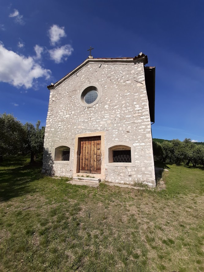 Facciata della chiesa di S. Pietro in Brian - Comune di Cazzano di Tramigna (VR).